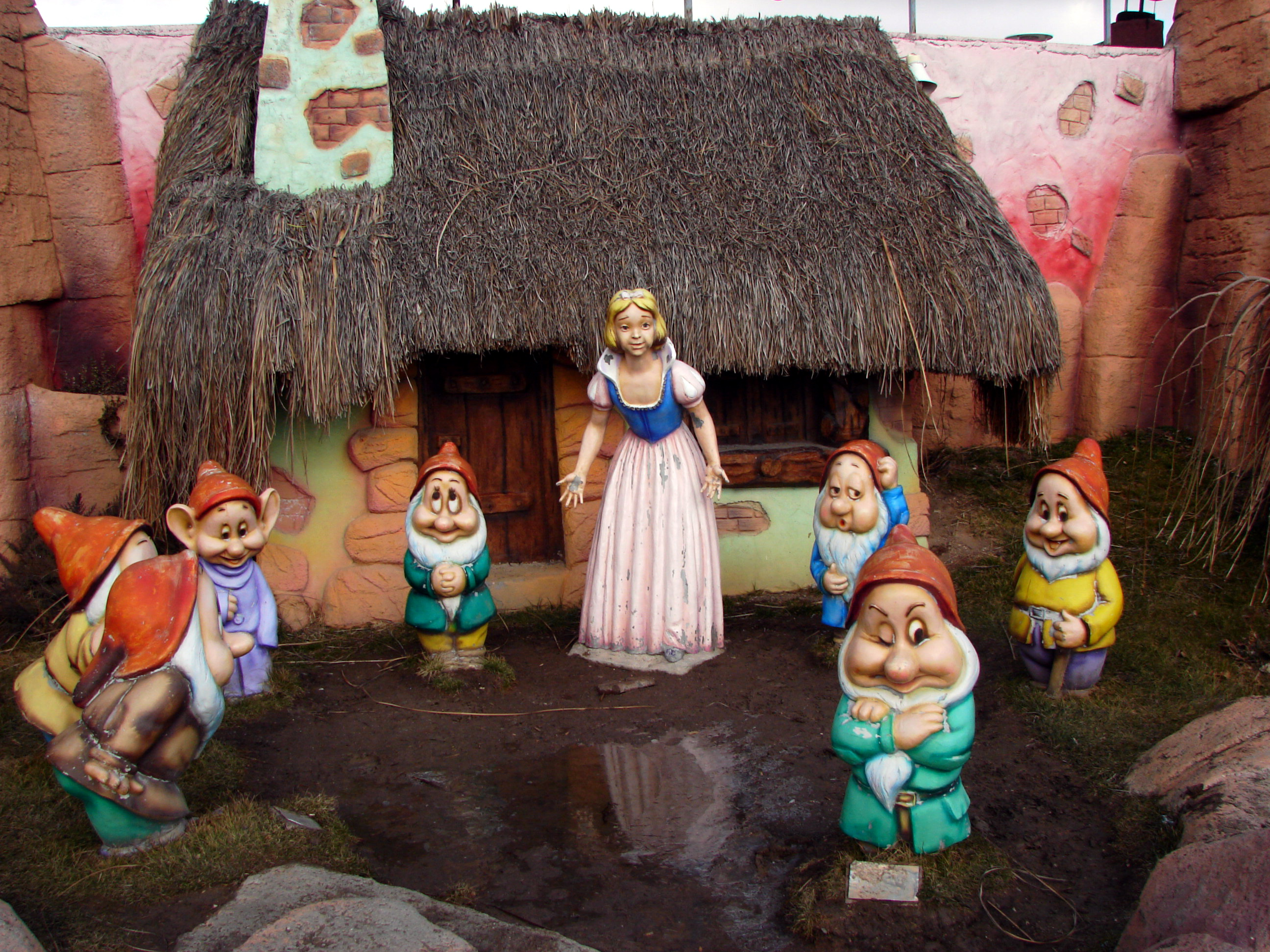 Ankara Amusement Park